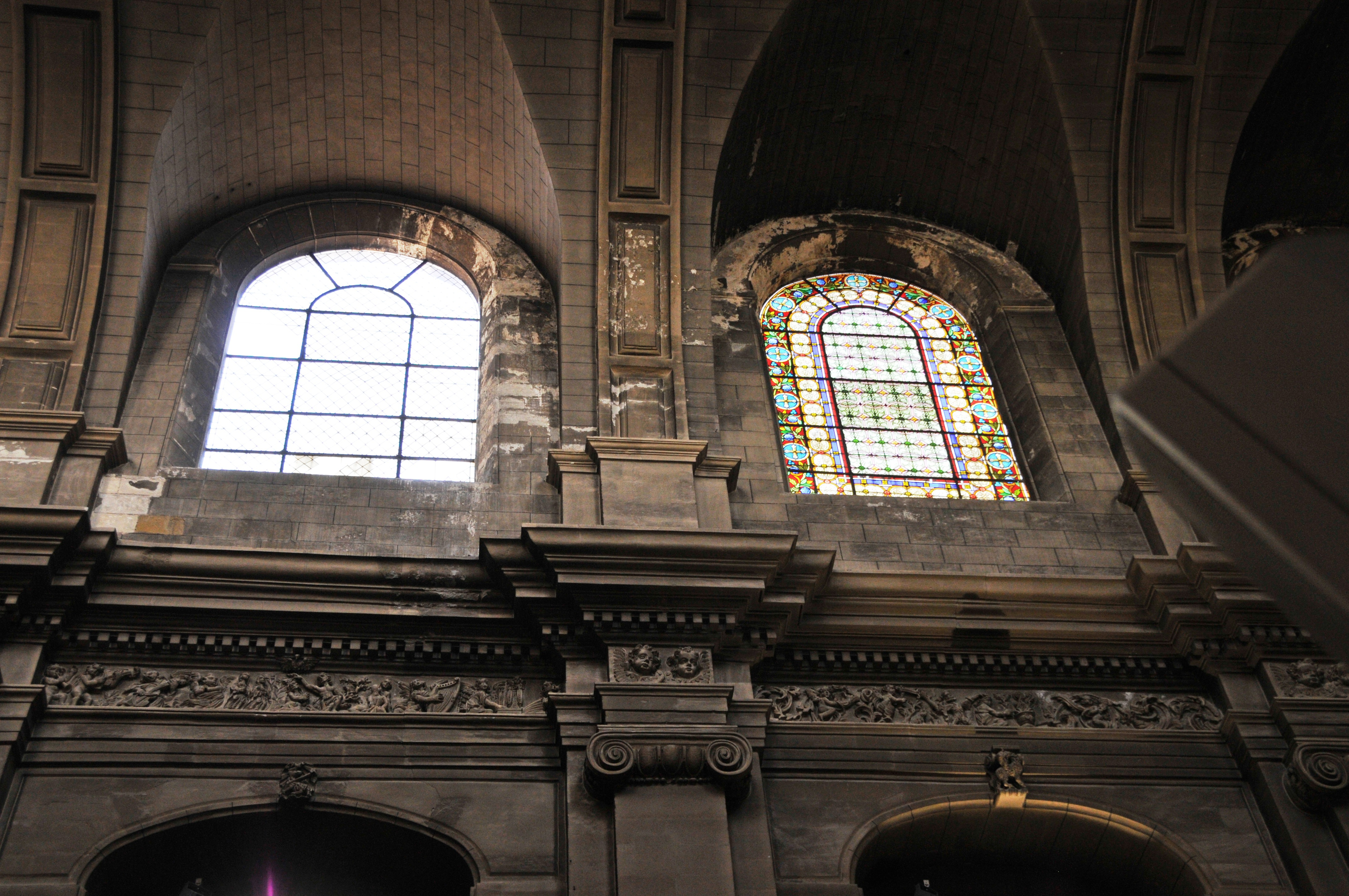 Dax, Kathedrale, Säulenpilaster